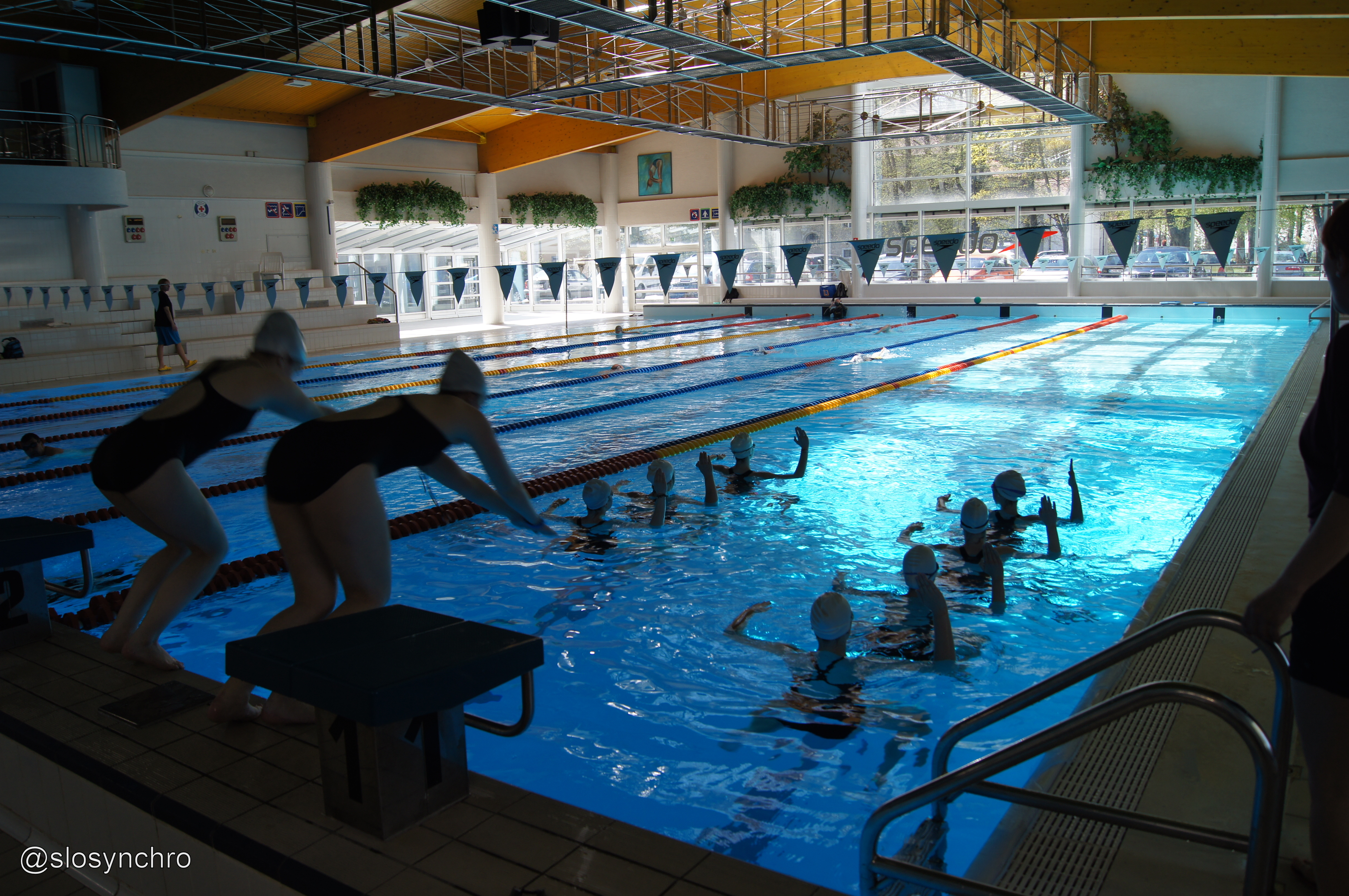 Trening slovenske reprezentance 2015